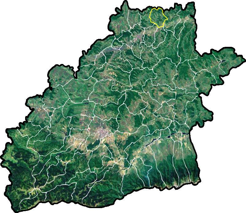 Alma jud Sibiu.